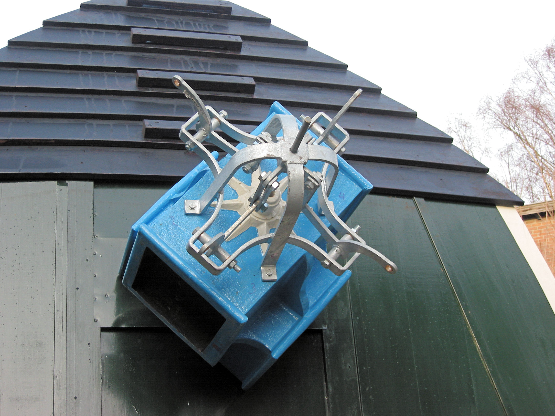 Spin voor bediening remkleppen van de Concordia molen te Ede